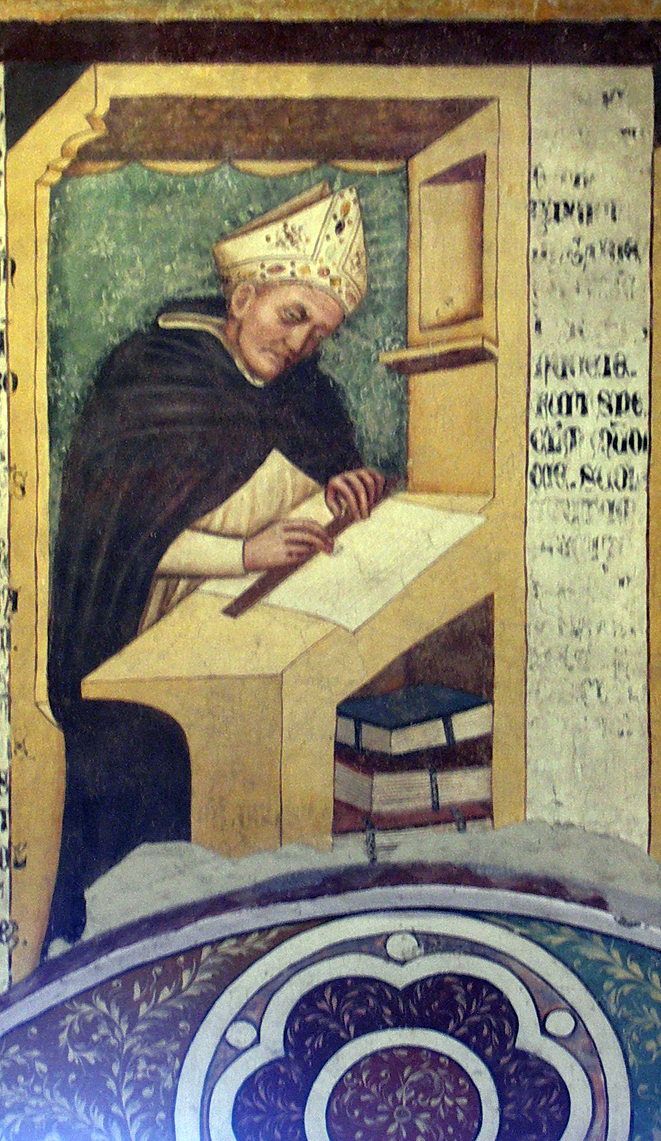 Agostino di Traù, serie dei Quaranta domenicani illustri, ex convento di San Niccolò, Sala del Capitolo, Treviso, 1352 (altezza di ciascun ritratto 150 cm circa)